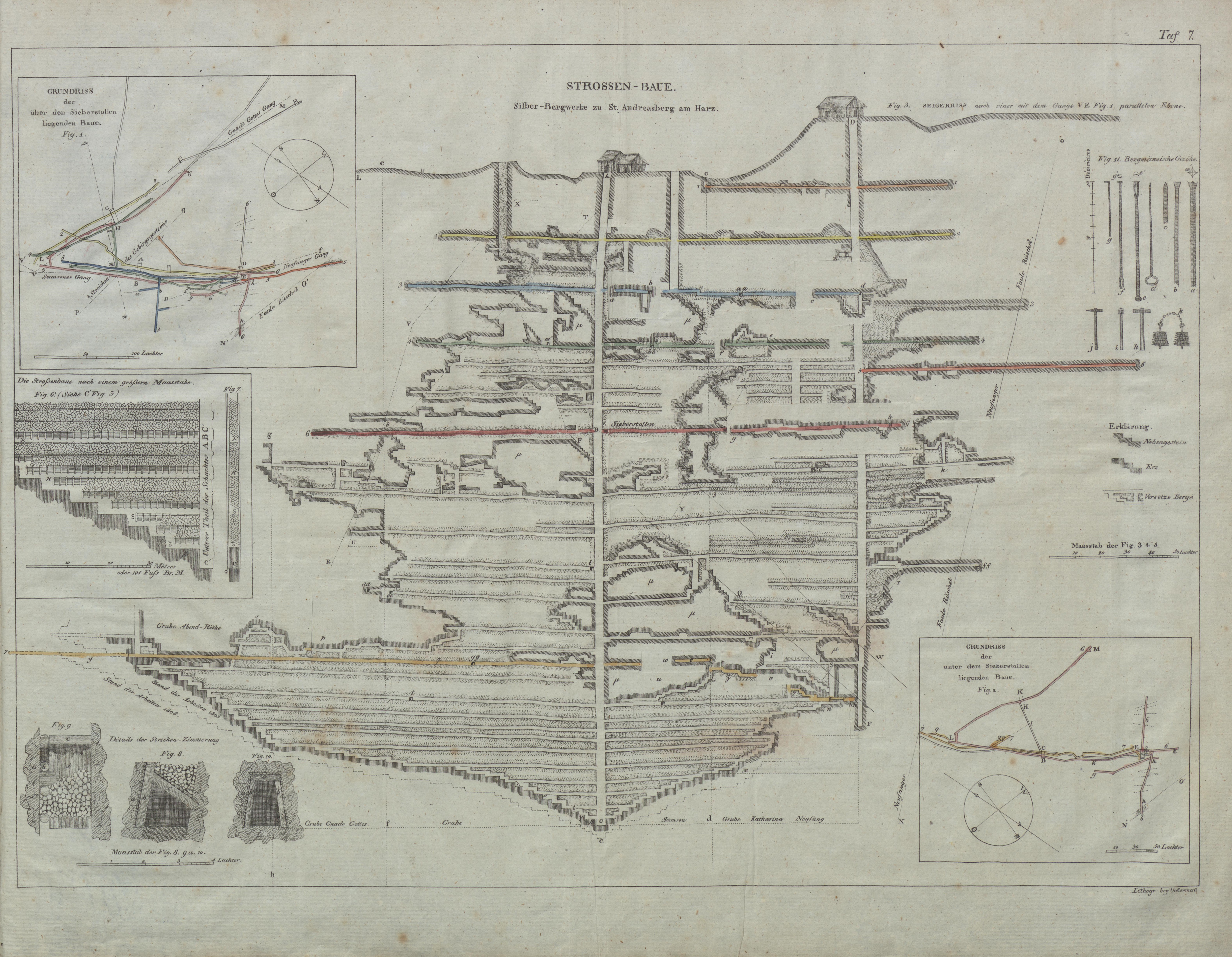 Abbildung aus: Atlas zu des Herrn von Villefosse Mineral-Reichthum